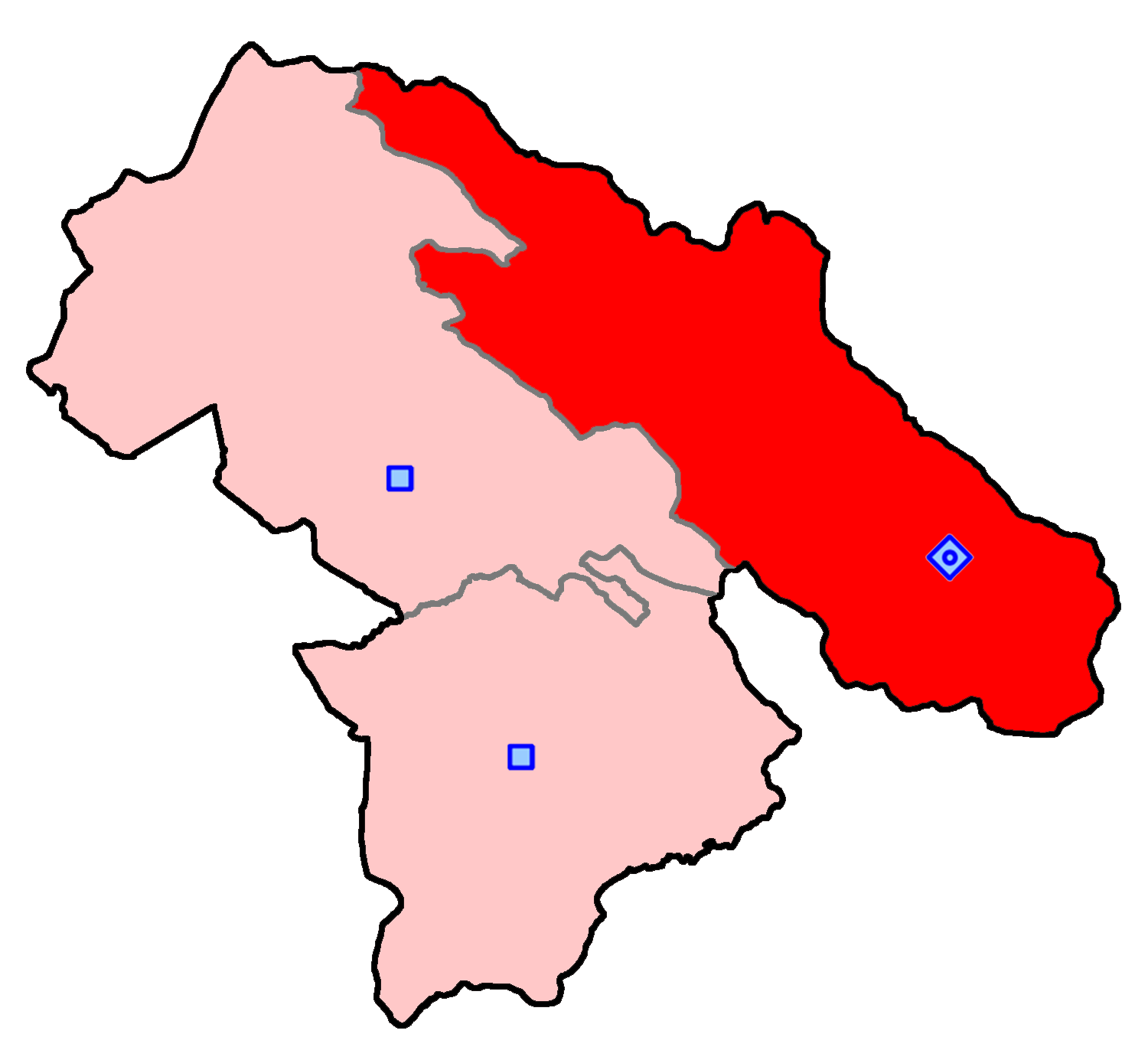 حوزهٔ انتخاباتی بویراحمد و دنا برای انتخابات مجلس شورای اسلامی